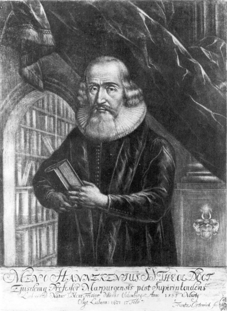 Menno Hanneken (* 1. März 1595; † 17. Februar 1671), deutscher lutherischer Theologe und Superintendent der Stadt Lübeck. Kupferstich, 293x229 cm